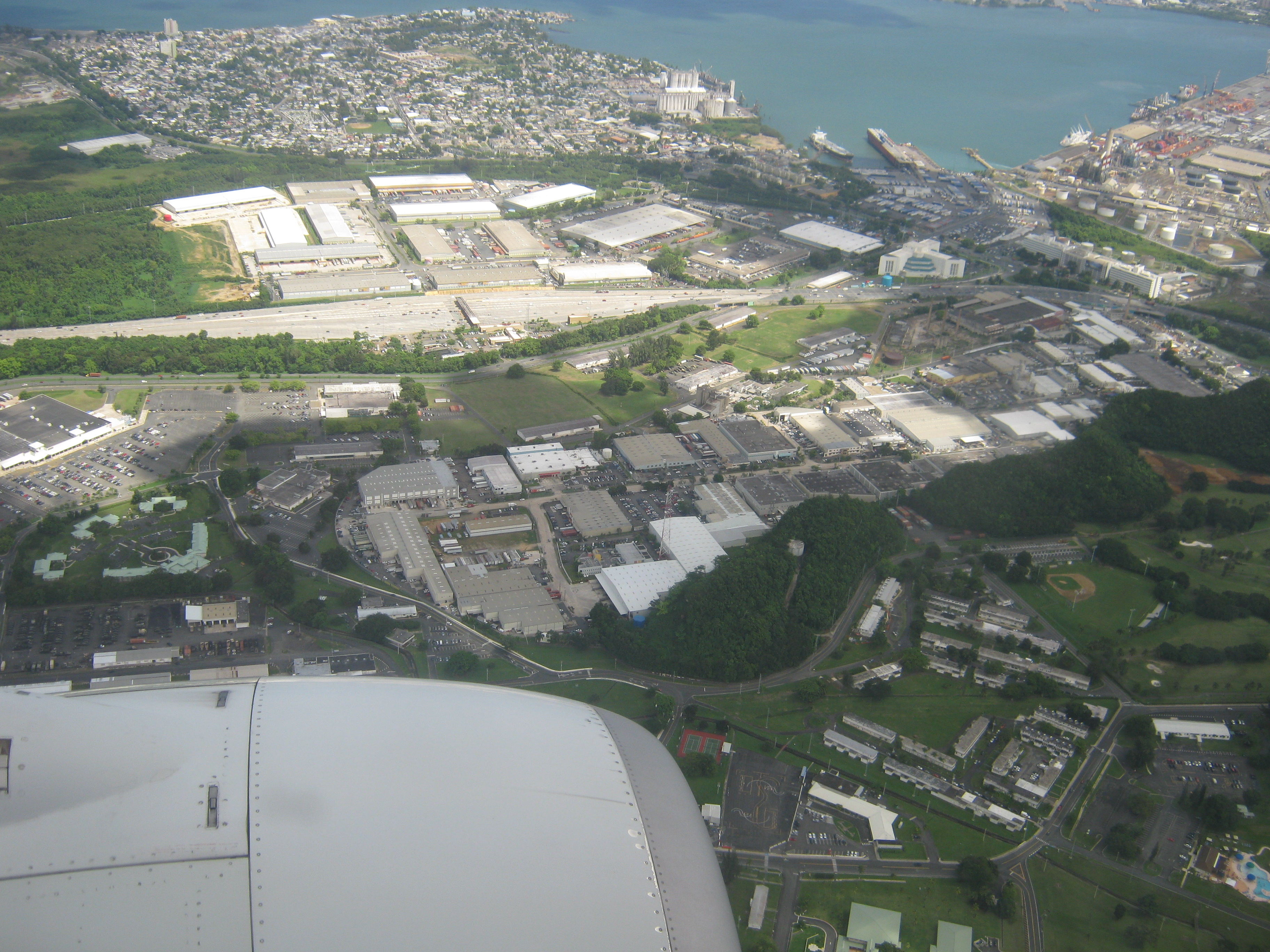 Vista Aerea, Cataño y Navieras de Puerto Rico y termoelectrica palo seco